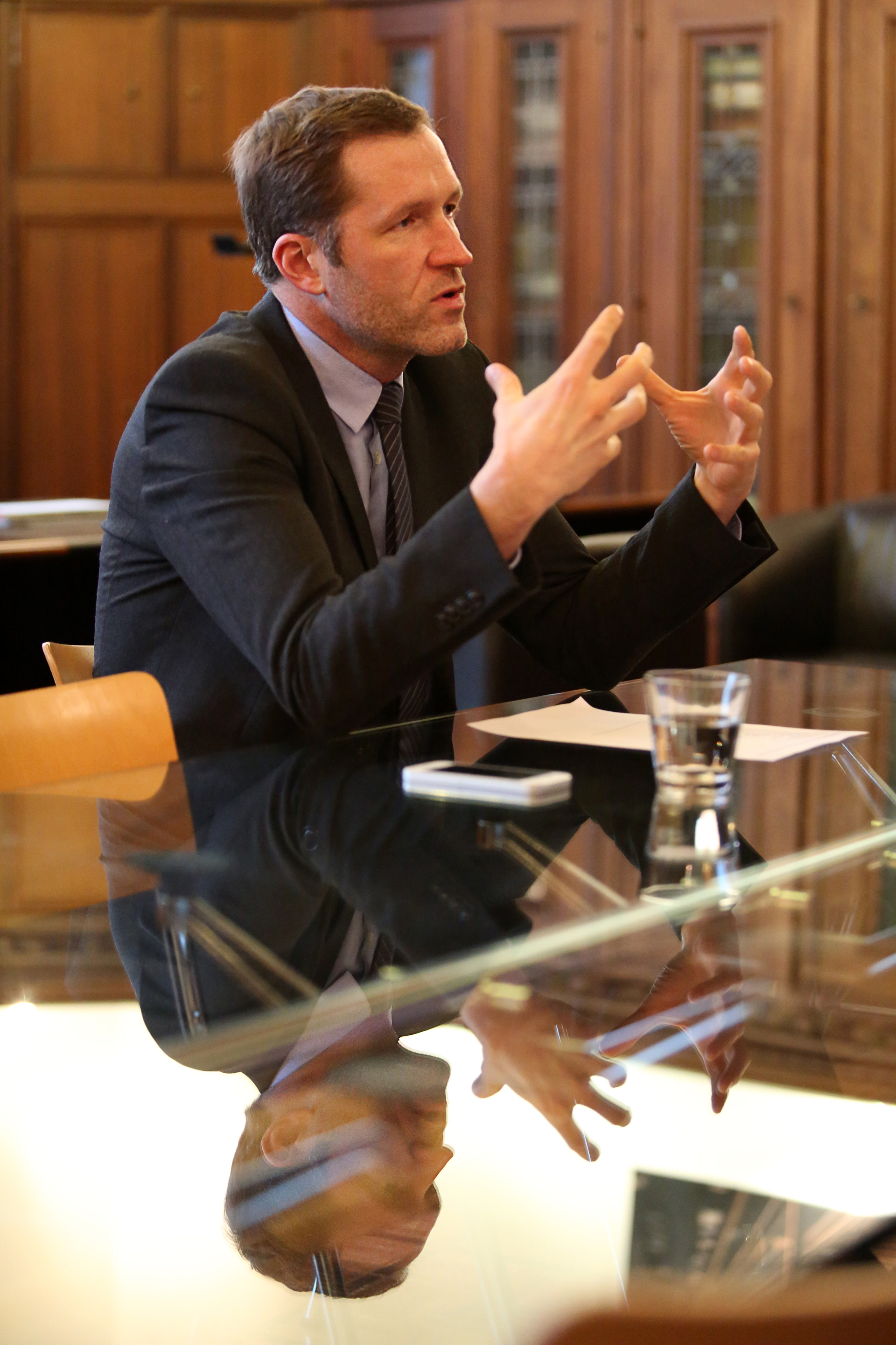 Portrait de Paul Magnette--Zajje (talk) 09:45, 23 March 2016 (UTC)